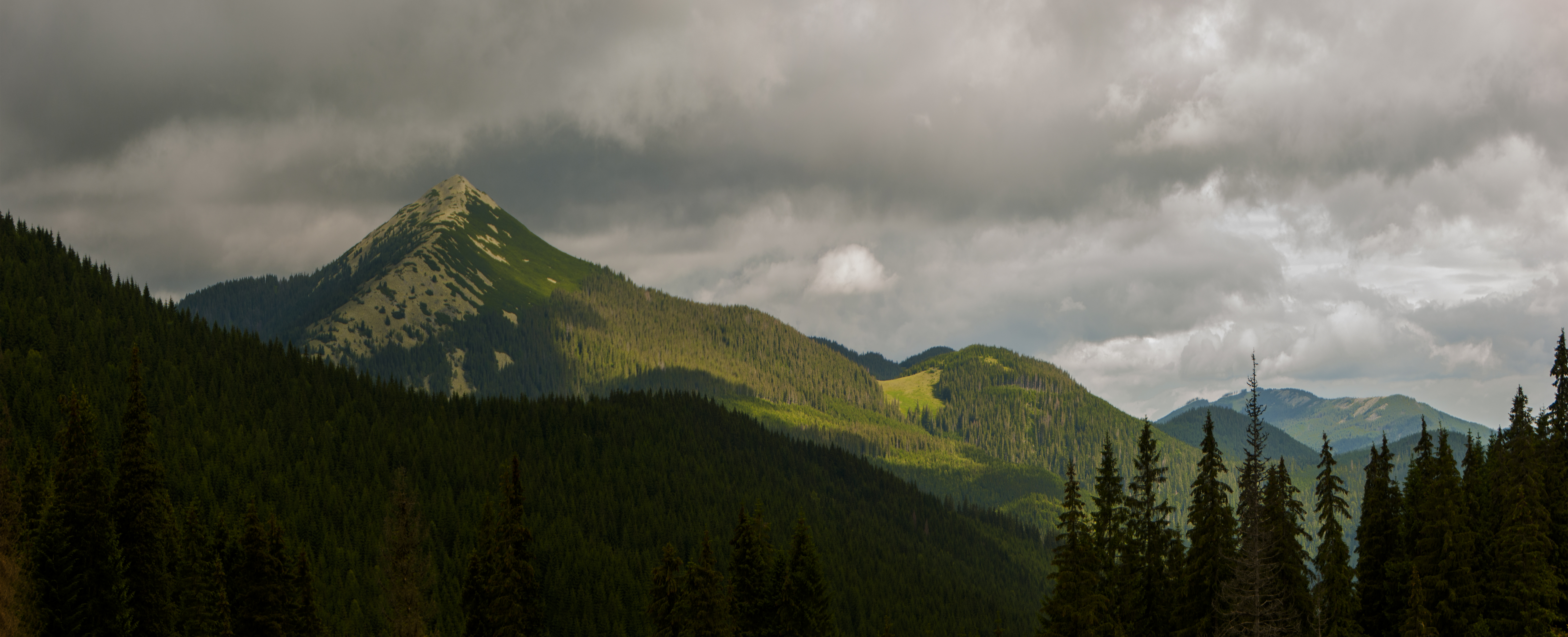 «Ґорґани», Надвірнянський район, Бистрицька та Зеленська сільські ради